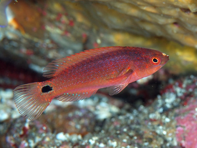 ニシキイトヒキベラ Cirrhilabrus exquisitus